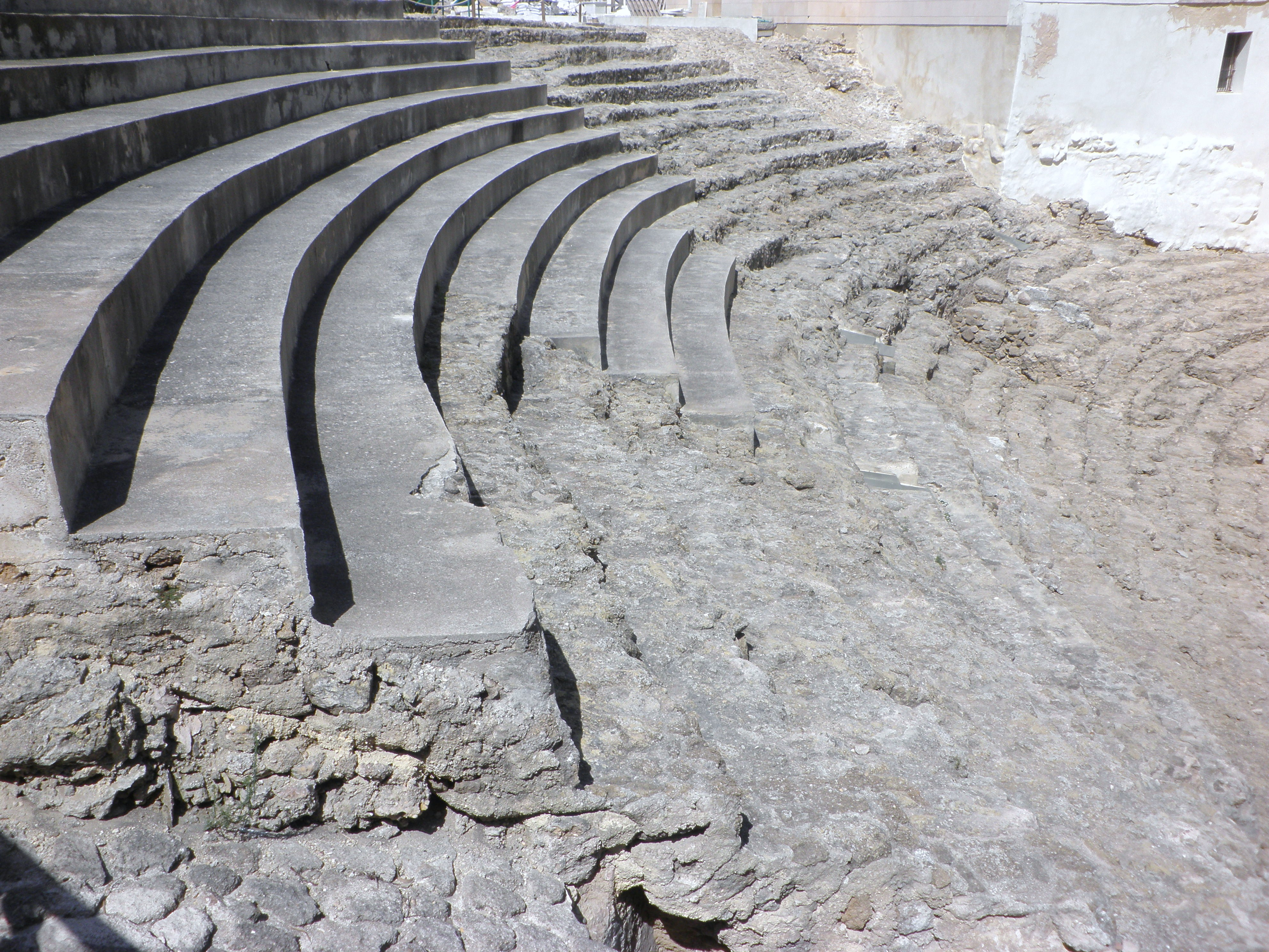 Teatro Romano de Cádiz, España